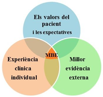 L'esquema de la MBE